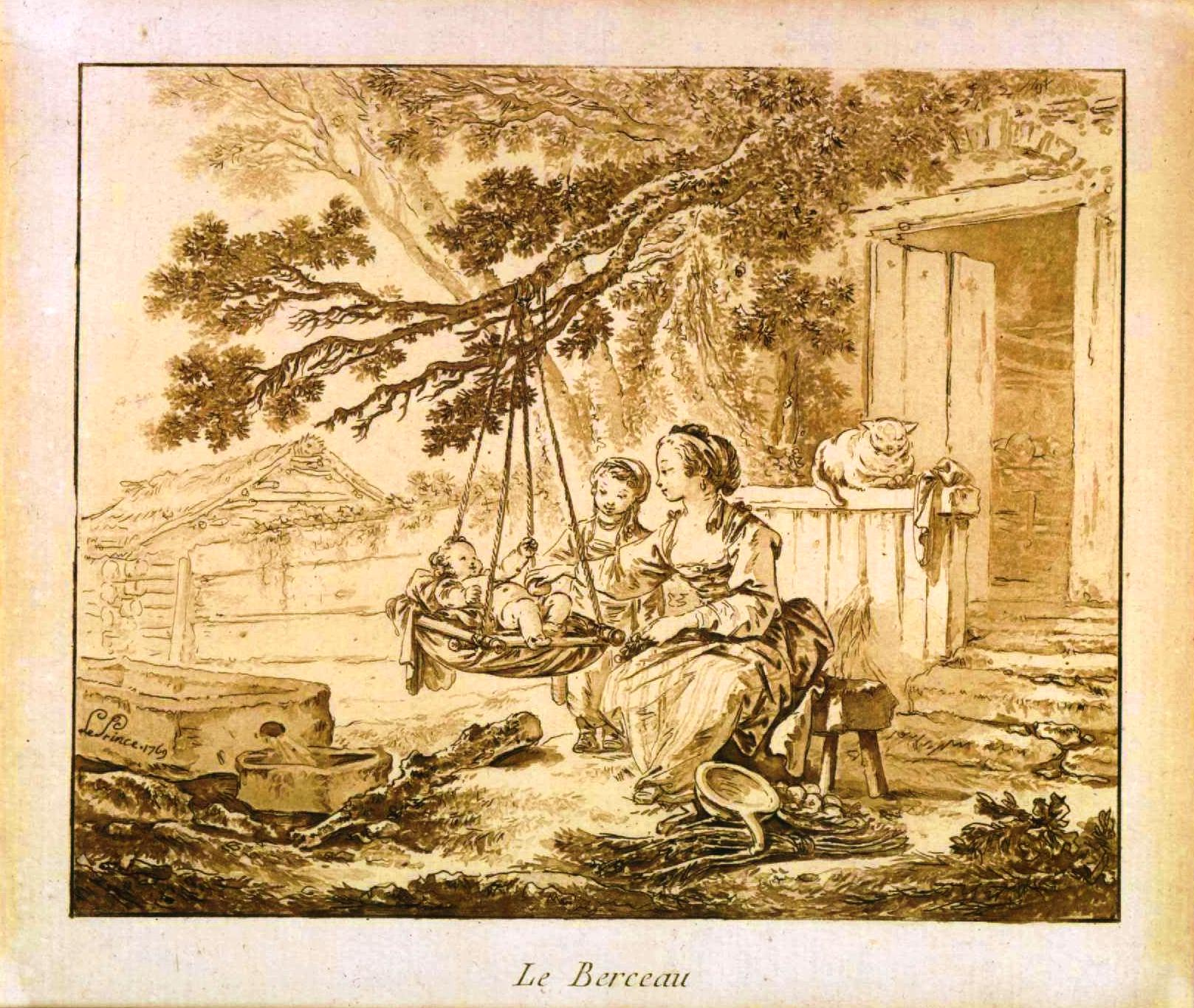 aquatinte